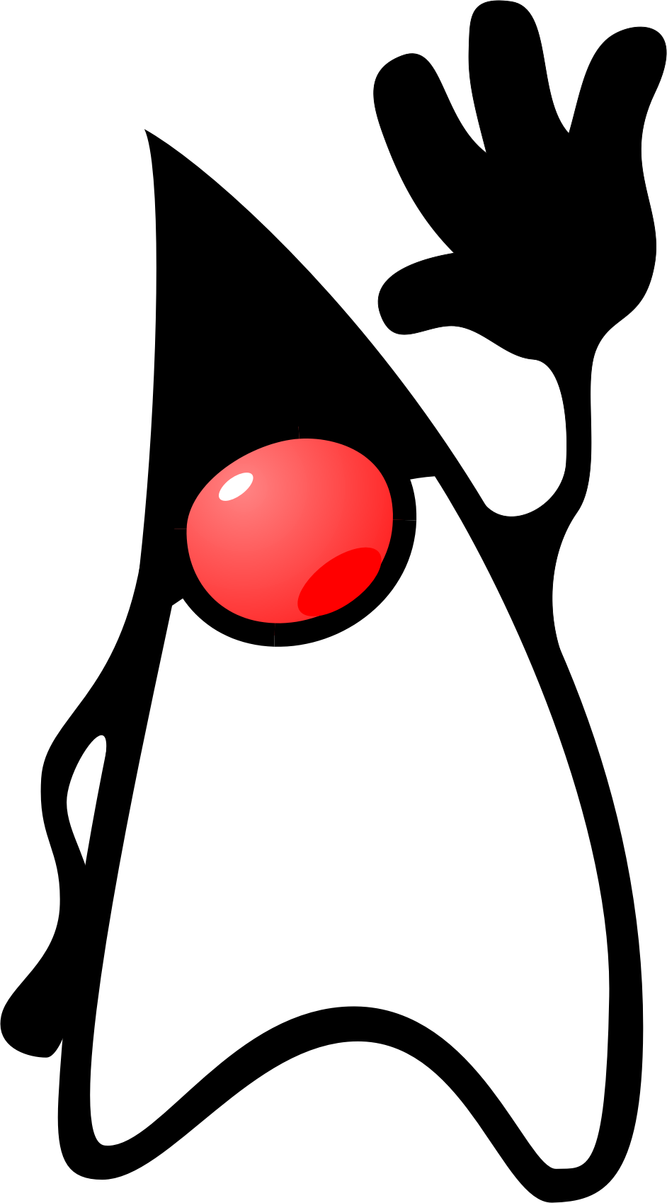 Java-ს პერსონაჟი Duke